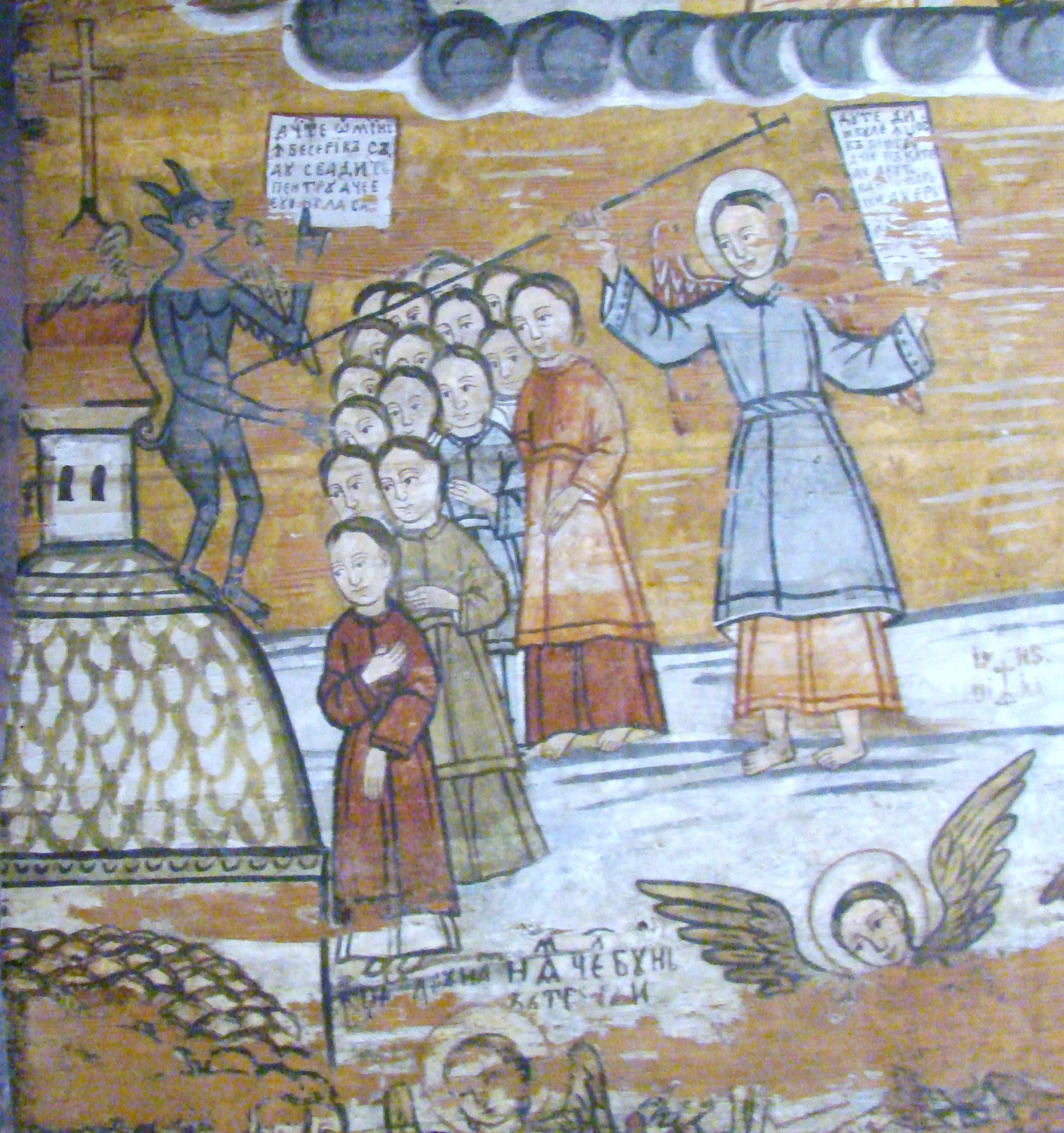 Biserica de lemn "Naşterea Maicii Domnului", sat IEUD